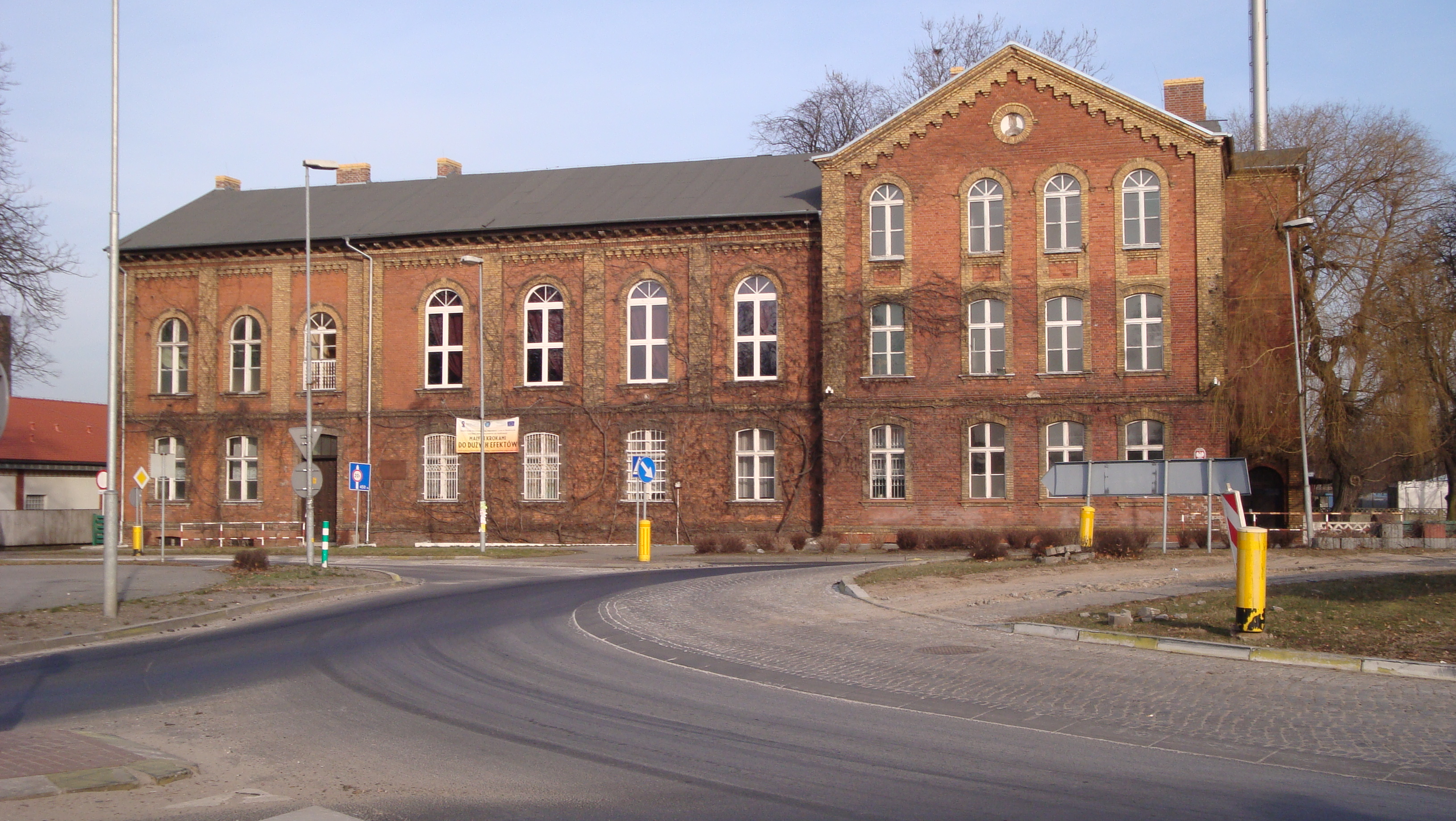 Zespół Szkół Technicznych im. Stanisława Lema w Skwierzynie, ul. Poznańska